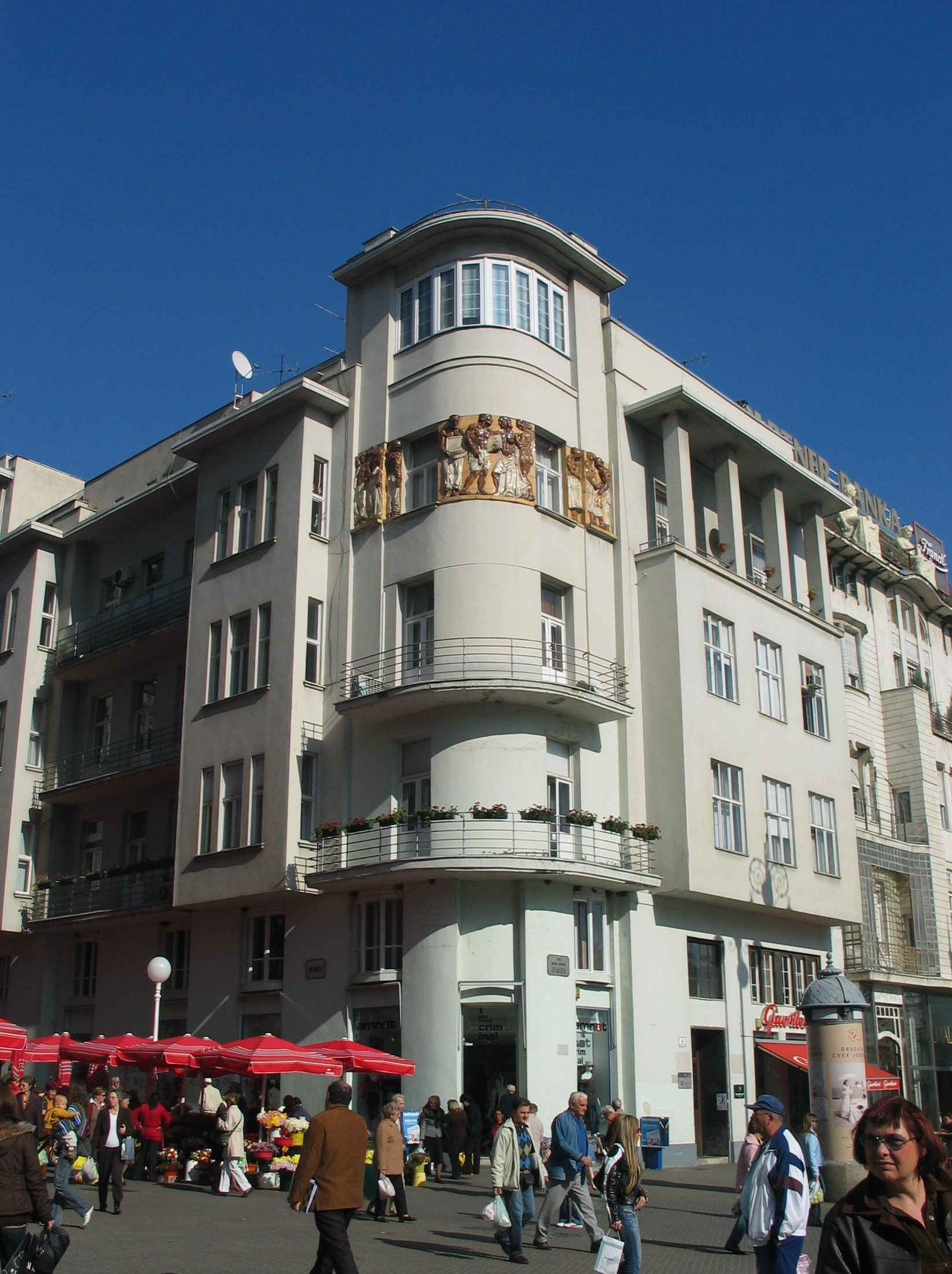 Zgradi Popović, Trg bana Jelačića, Zagreb